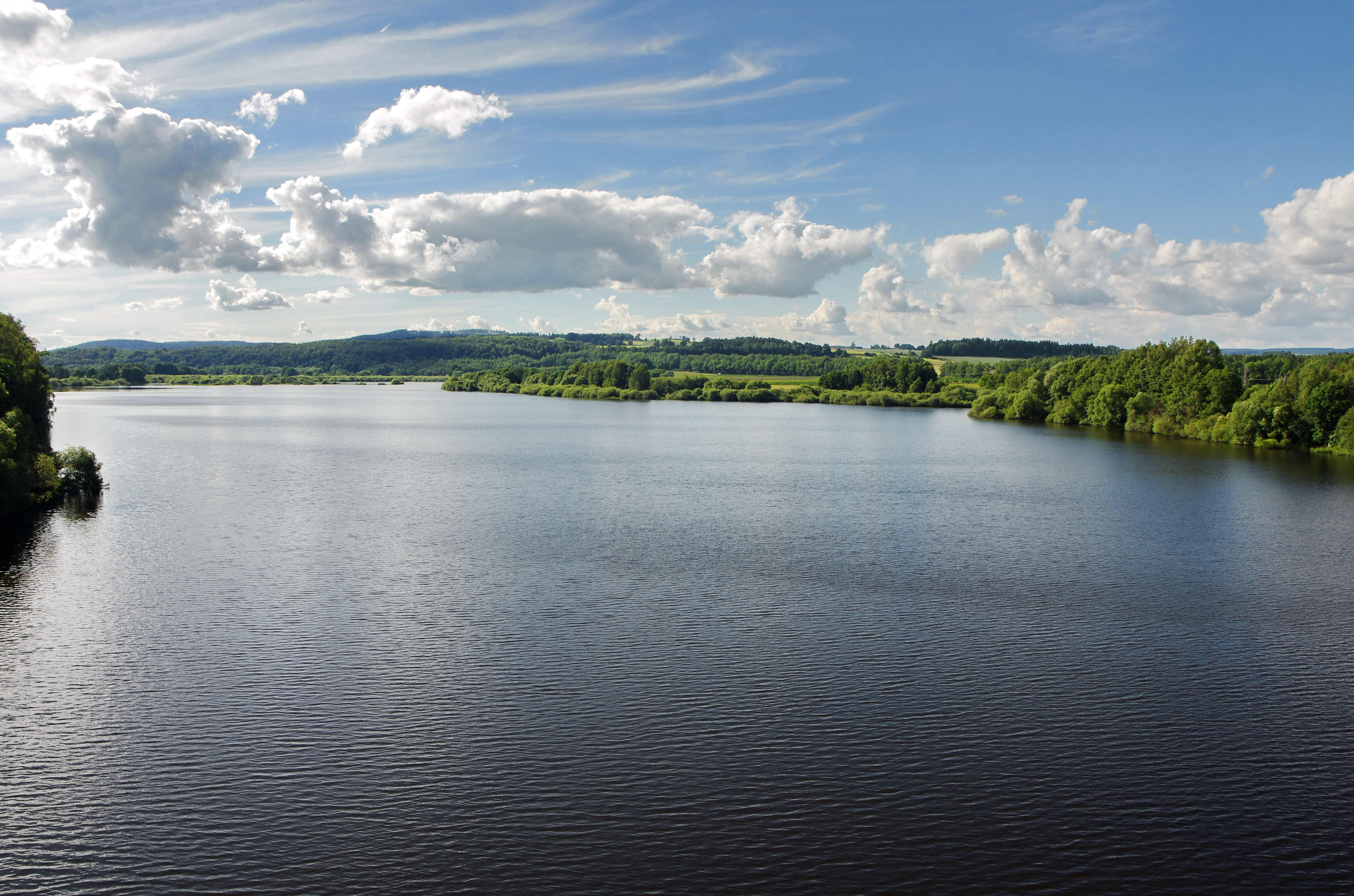 Vodní nádrž Skalka na Ohři, okres Cheb